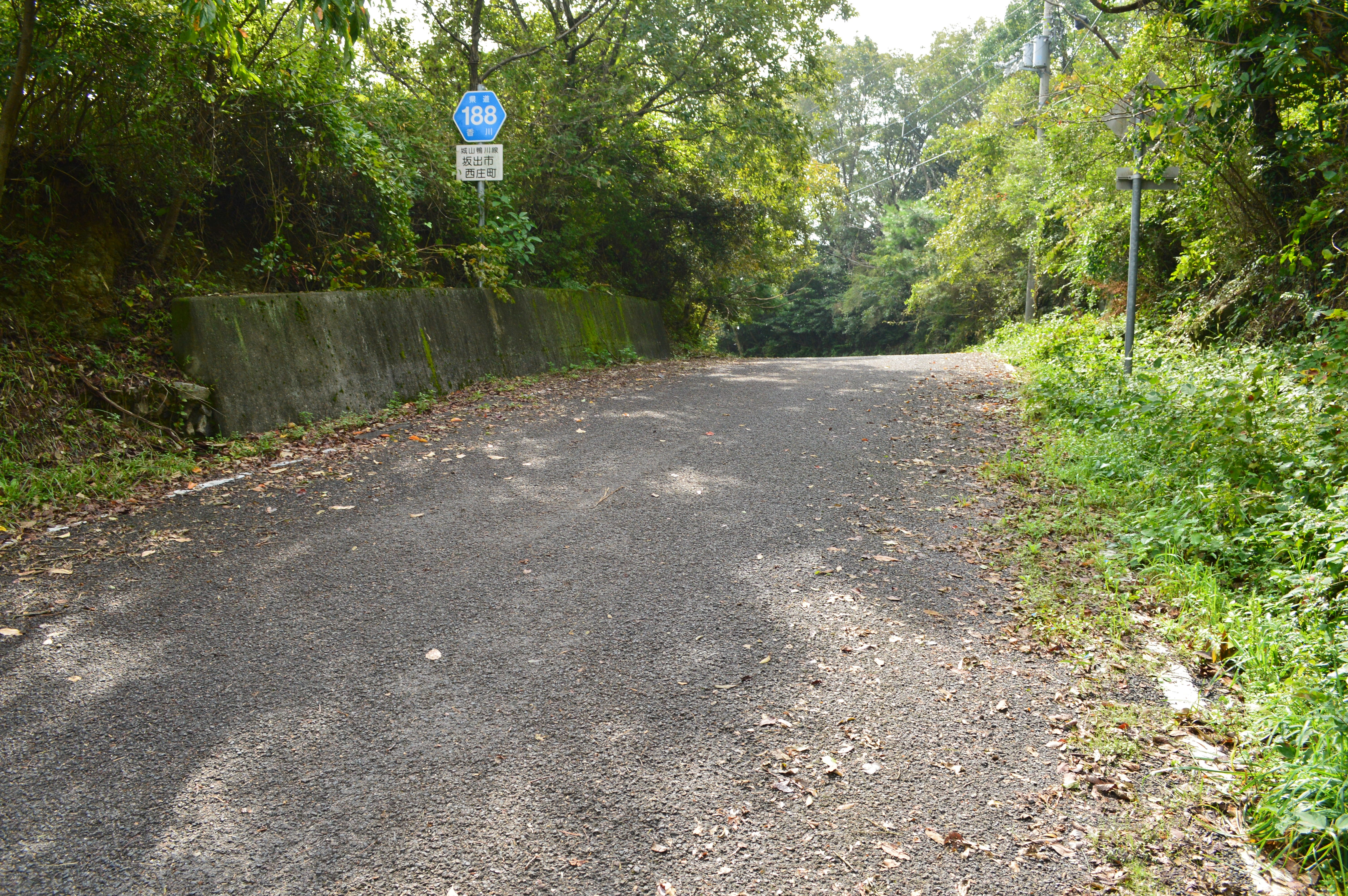 香川県道188号 (城山山中)（ファイル名の「Kagawai」は「Kagawa」の誤り）